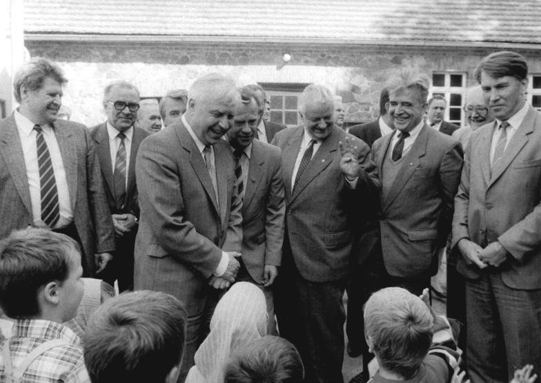 LPG Neuzelle, Besuch einer KPdSU-Delegation ADN-ZB Franke 13.9.89- Bez. Frankfurt: KPdSU-Delegation- Die in der DDR weilende Delegation des ZK der KPdSU unter Leitung von Jegor Ligatschow (3.v.l.), Mitglied des Politbüros und Sekretär des ZK, besuchte Genossenschaftsbauern in der Kooperation Neuzelle im Kreis Eisenhüttenstadt. Bei einem Rundgang durch das Dorf Möbiskruge besuchte die Abordnung auch den Kindergarten des Ortes. 3.v.r.: Werner Krolikowski, Mitglied des Politbüros und Sekretär des ZK der SED.